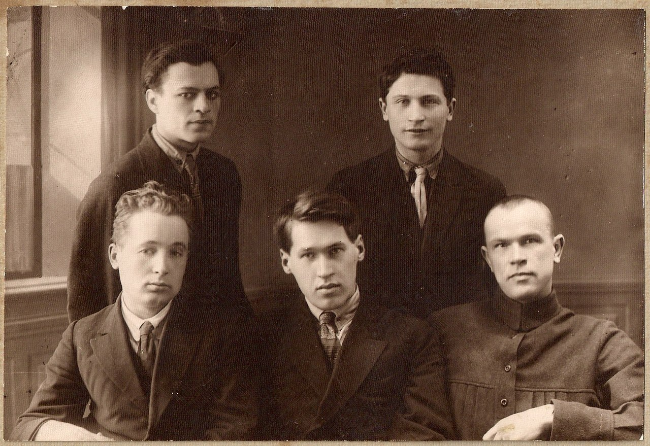 Беларуская (тарашкевіца): Рэдкалегія часопіса «Ўзвышша». Сядзяць: Кузьма Чорны, Уладзімер Дубоўка, Кандрат Крапіва. Стаяць: Адам Бабарэка, Язэп Пушча. Менск, 1927 г.